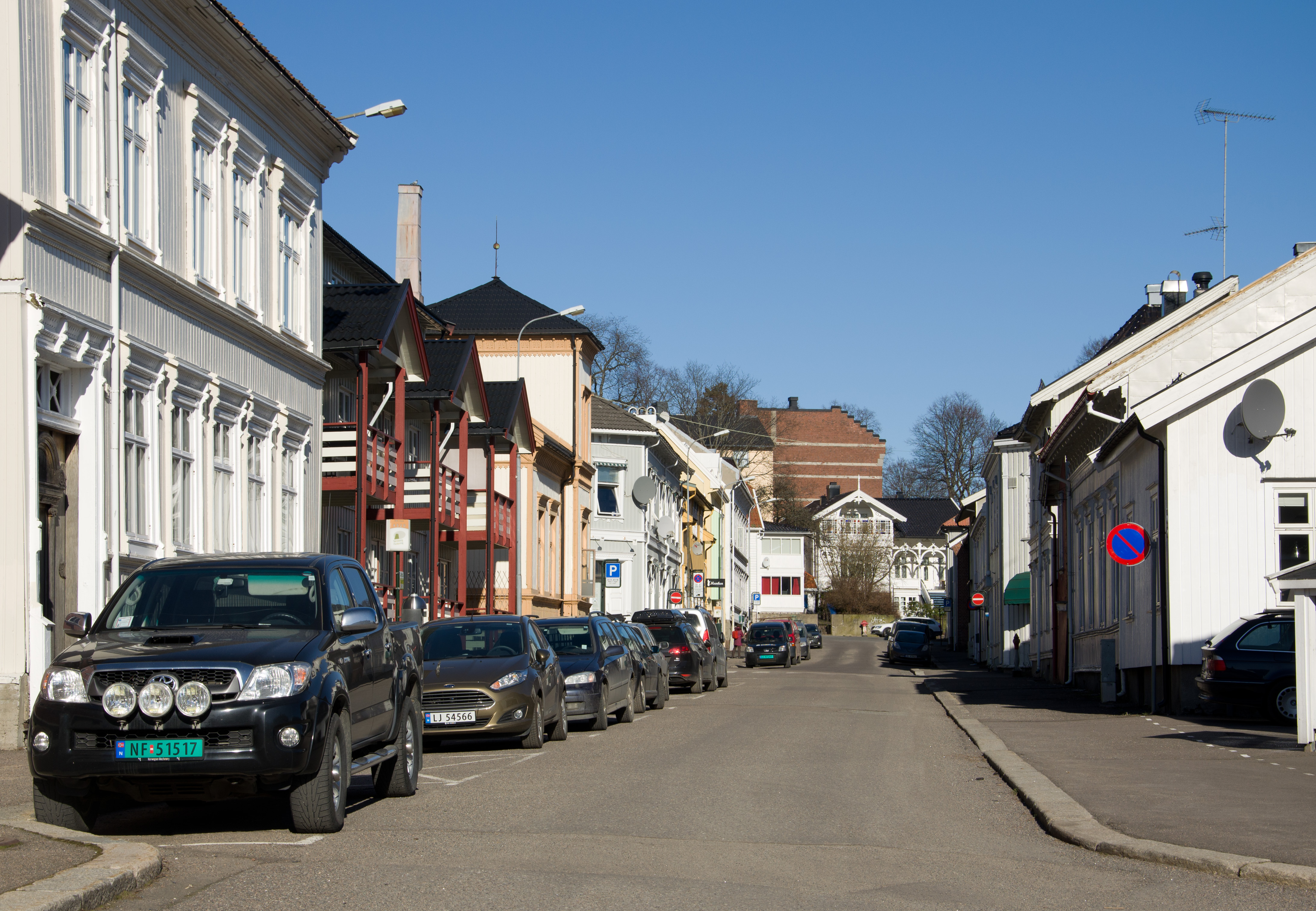 Munkegaten, Tønsberg